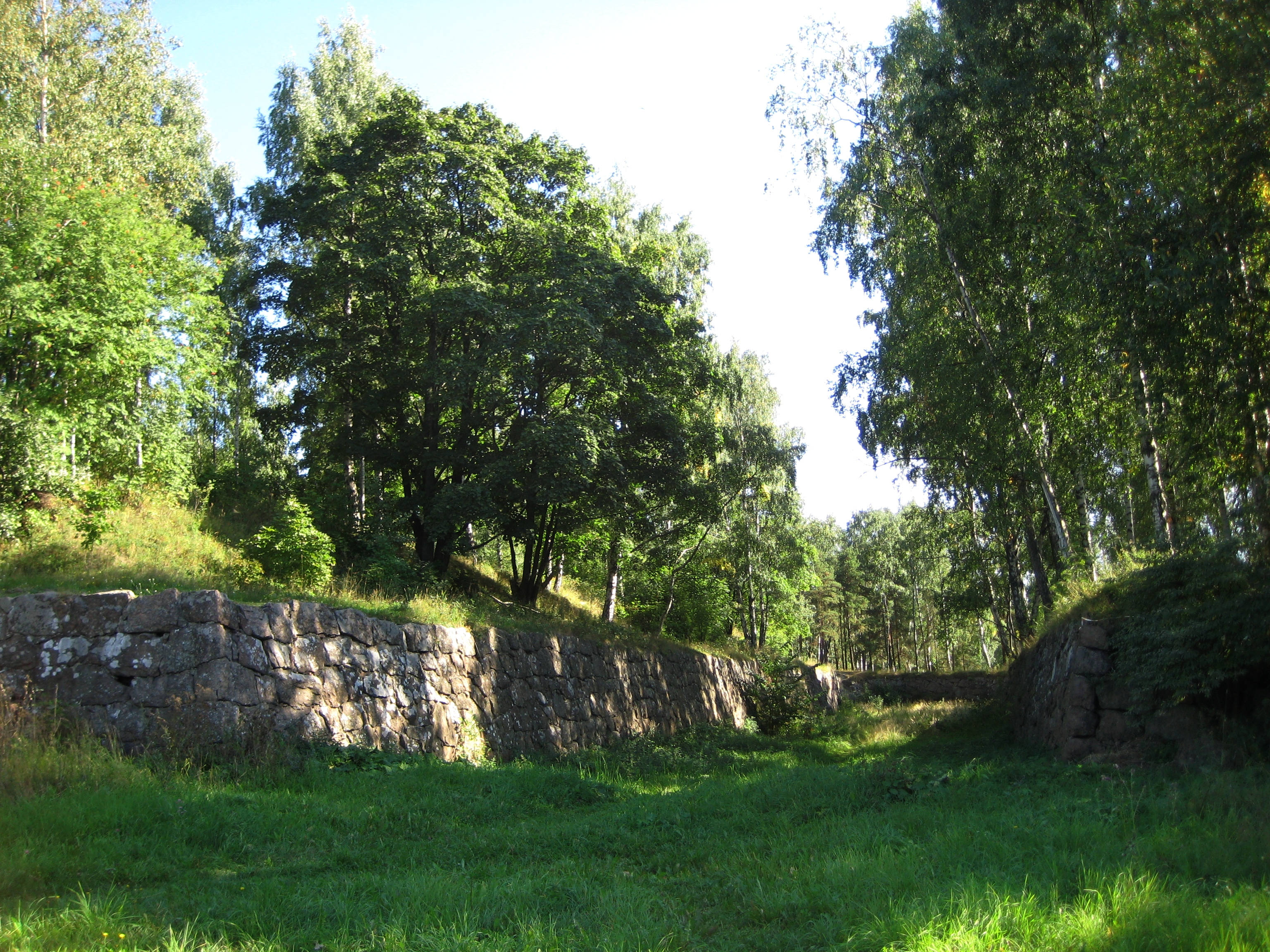 Выборг. Восточно-выборгские укрепления на Батарейной горе. Ров